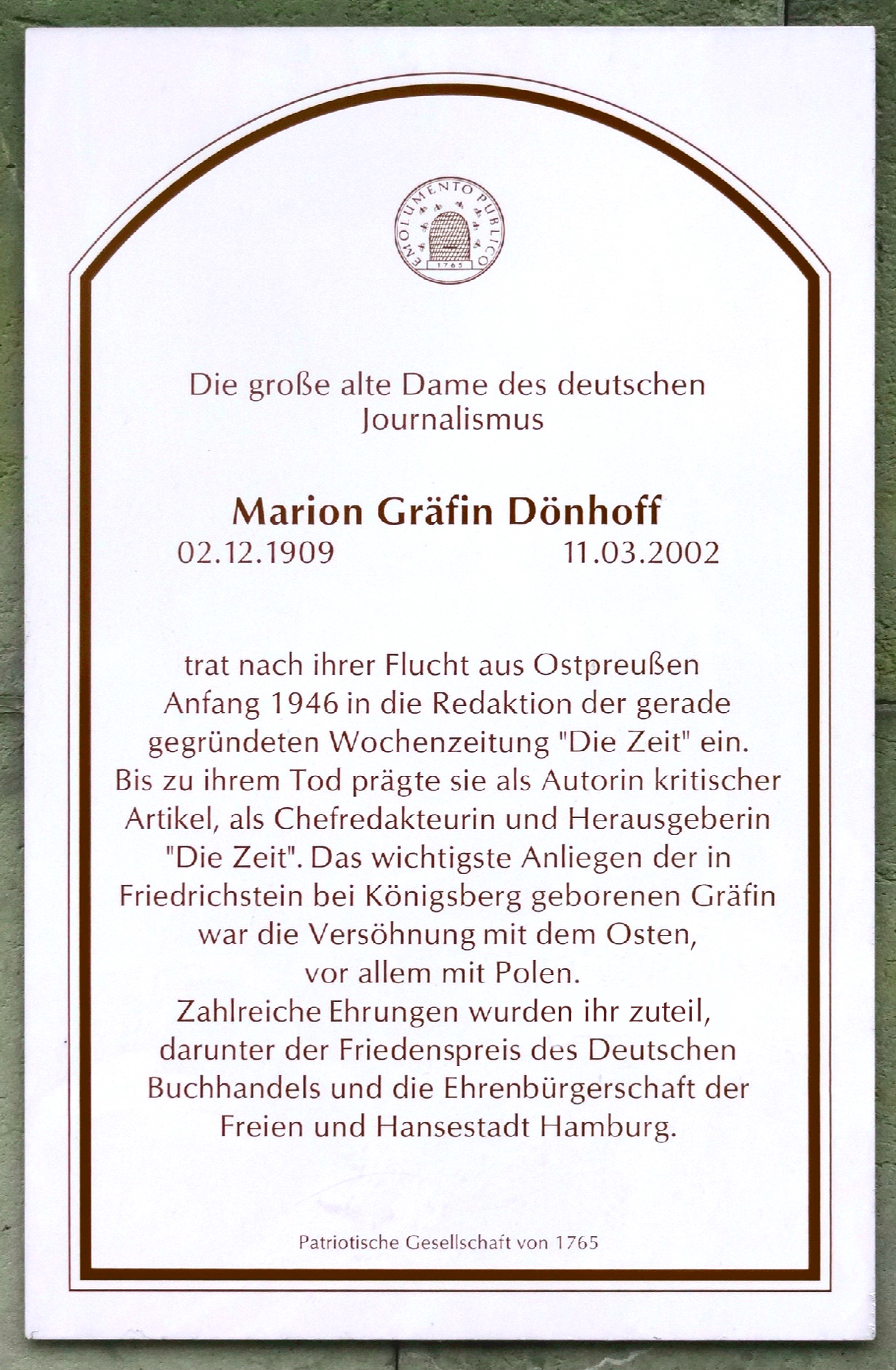 Pressehaus, Hamburg